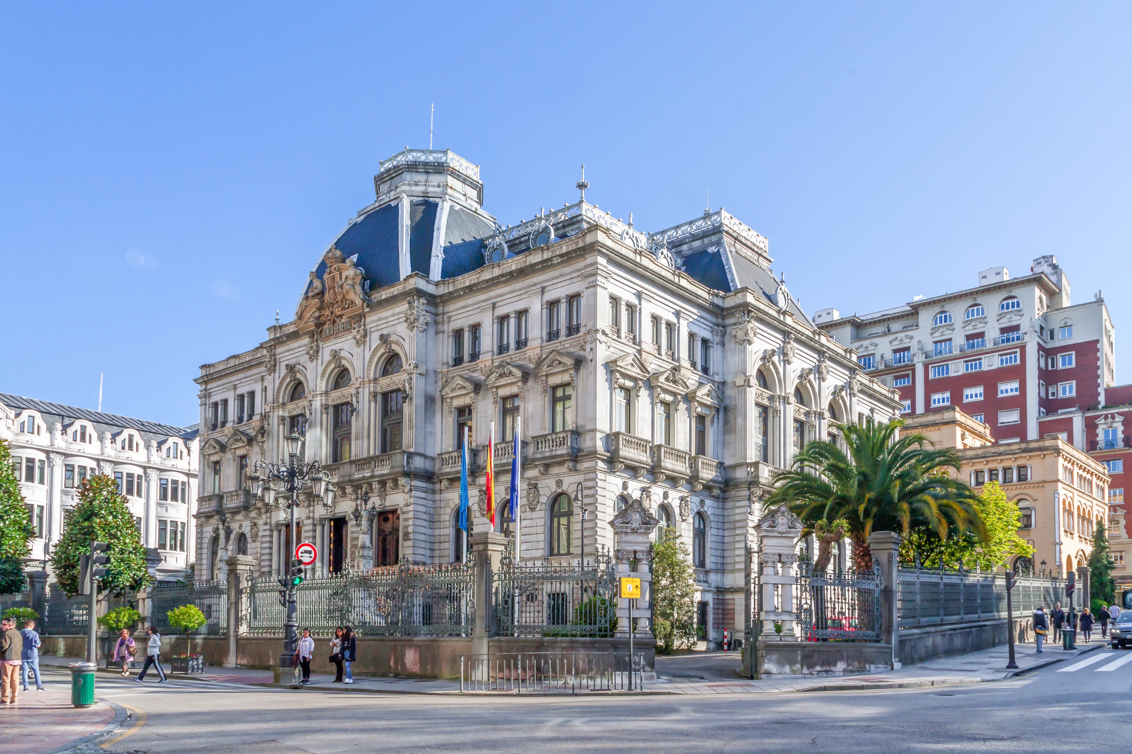 Oviedo, de ayer a hoy.